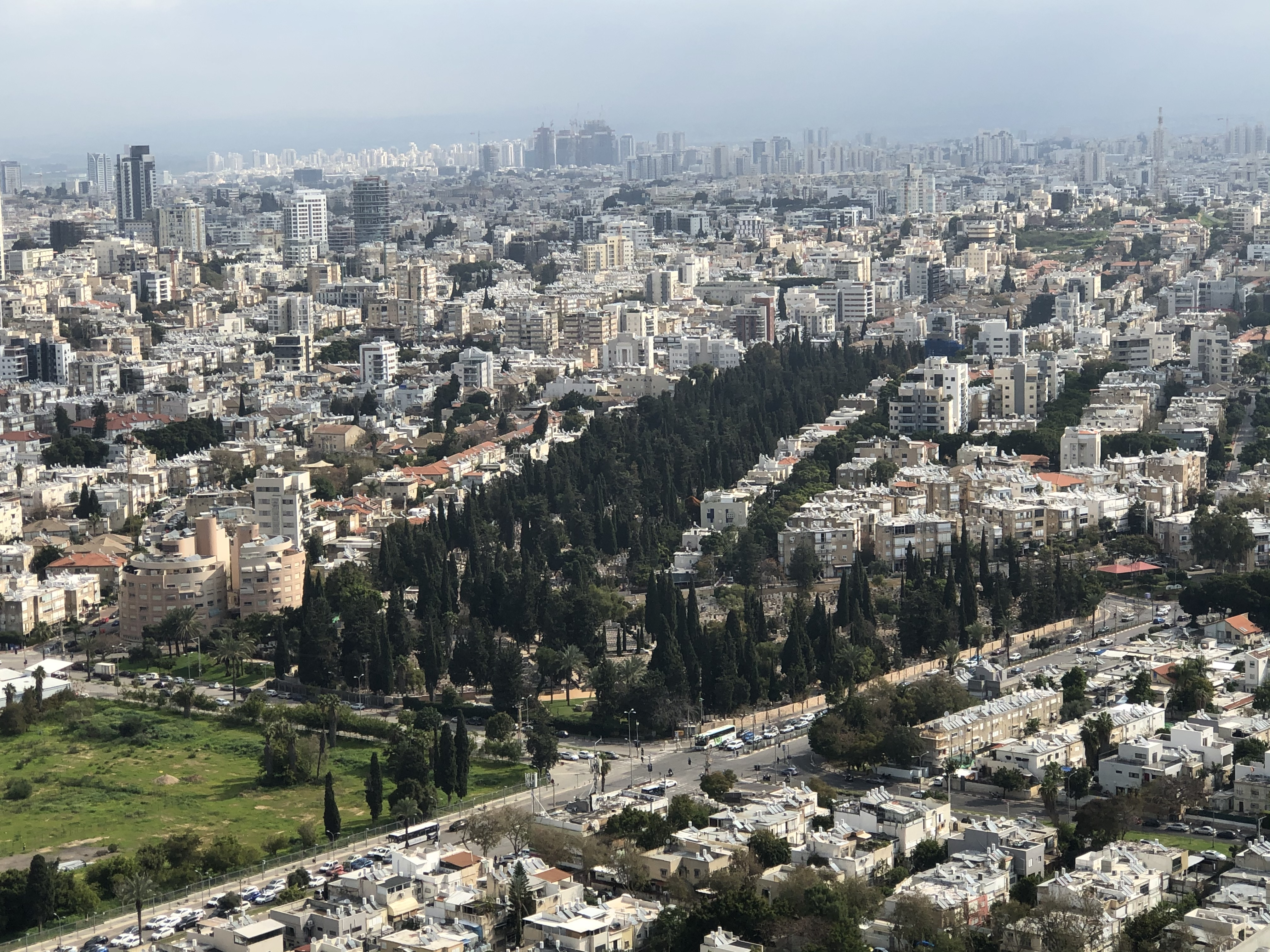 צילום של בית העלמין נחלת יצחק בתל אביב. צולם מקמפוס גוגל ברחוב יגאל אלון